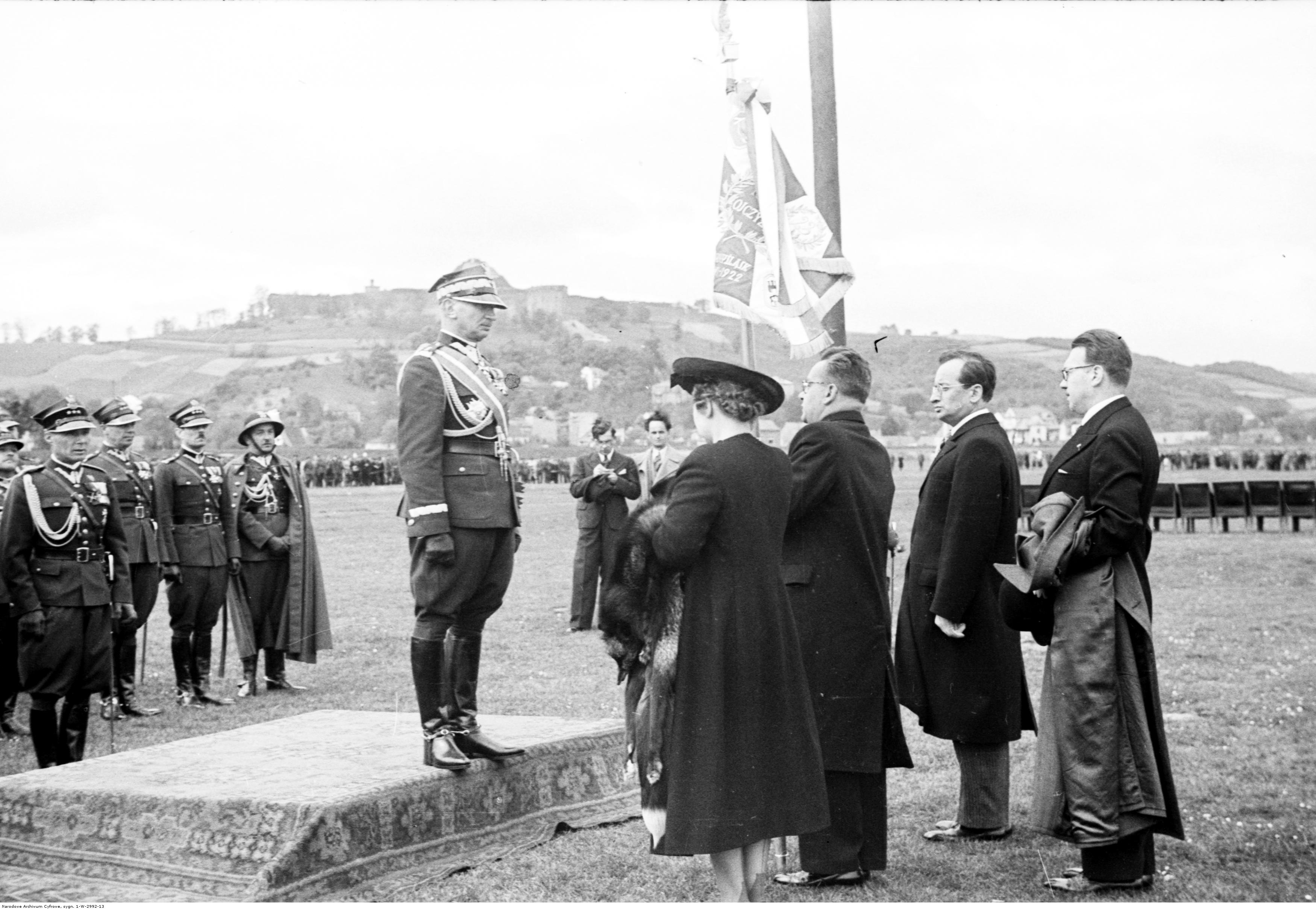 Wręczenie i poświęcenie sztandarów pułkom artylerii na krakowskich Błoniach 29 maja 1938. Przedstawiciele komitetu fundacji przekazują sztandar 23 Pułku Artylerii Lekkiej Inspektorowi Armii gen. dyw. Juliuszowi Rómmlowi. W składzie delegacji widoczny wojewoda kielecki Władysław Dziadosz. Koncern Ilustrowany Kurier Codzienny - Archiwum Ilustracji. Sygnatura: 1-W-2992-13